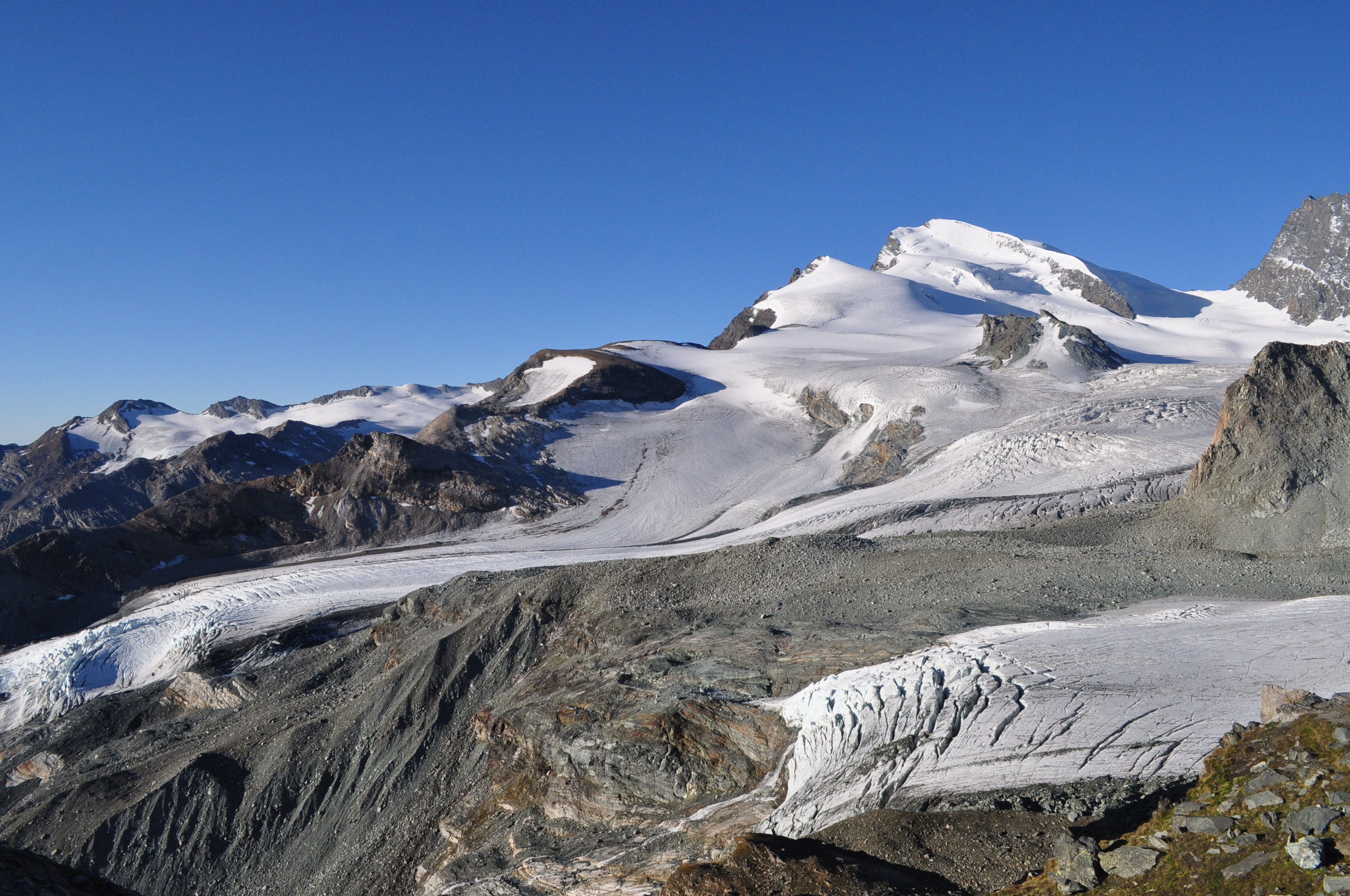 Der Allalingletscher mit dem Strahlhorn (4190 m)